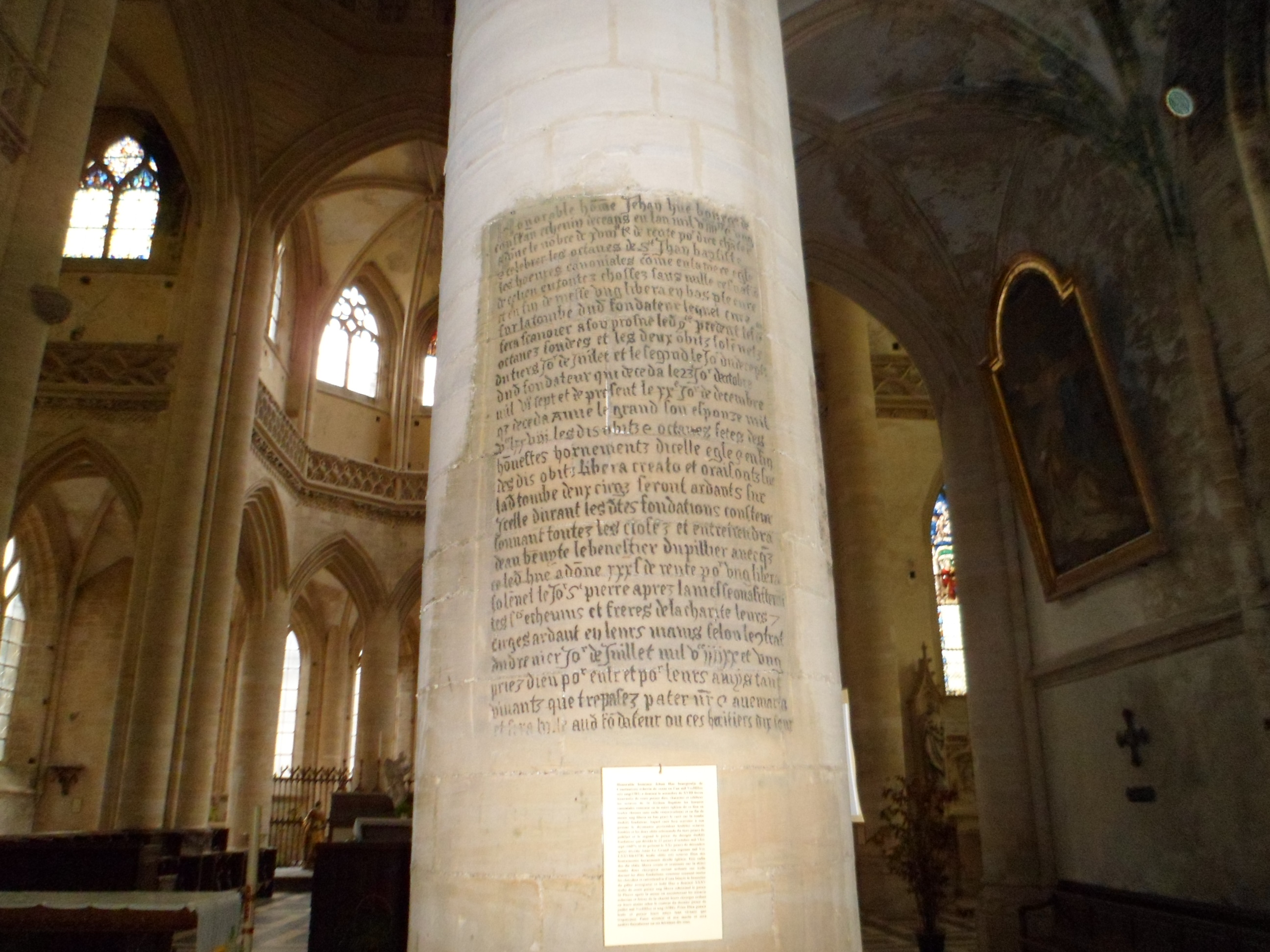 Eglise Saint-Pierre de Coutances - Inscriptions et transcription